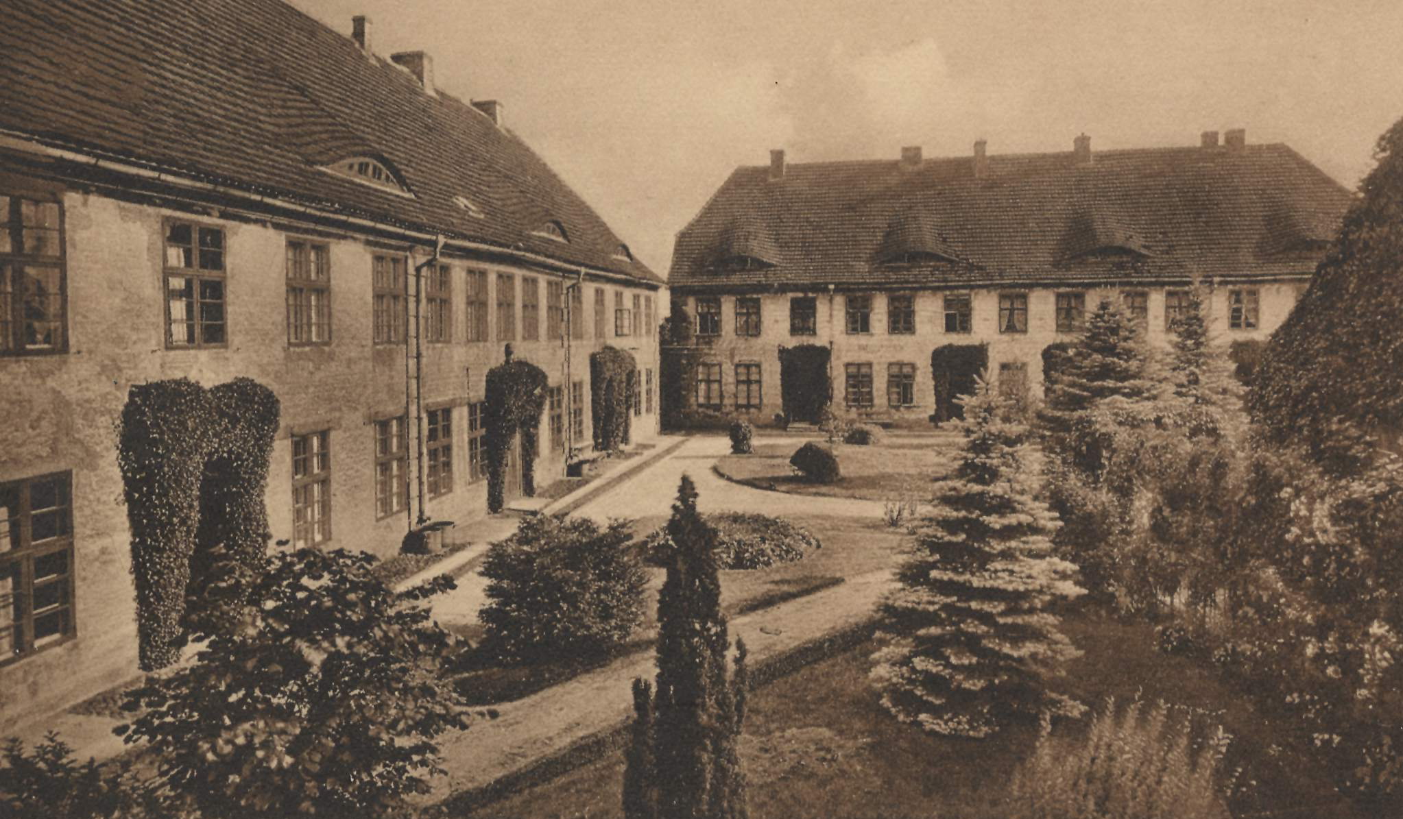 Bergen auf Rügen. Stift der adligen Damen.